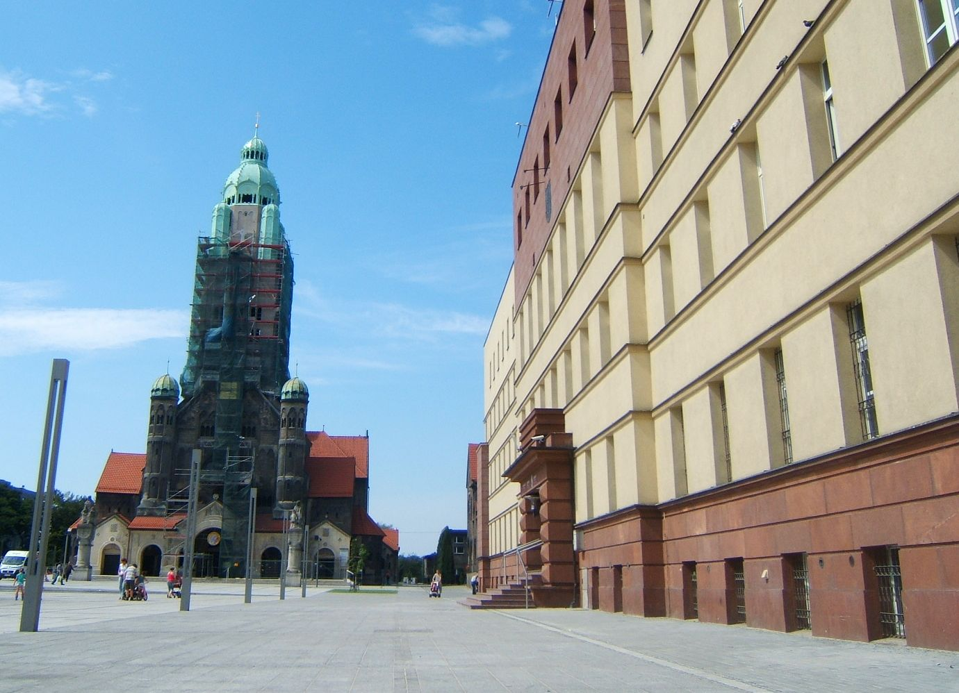 Nowy Bytom, Plac Jana Pawła II